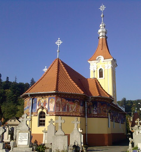 Biserica "Sfânta Treime" din cartierul Dârste, Braşov (construcţie 1783)